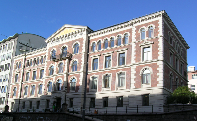 Christiania Tekniske Skole, Cort Adelers gate, Oslo. Built 1889. Today: Oslo University College (Høgskolen i Oslo), Faculty of Engineering.